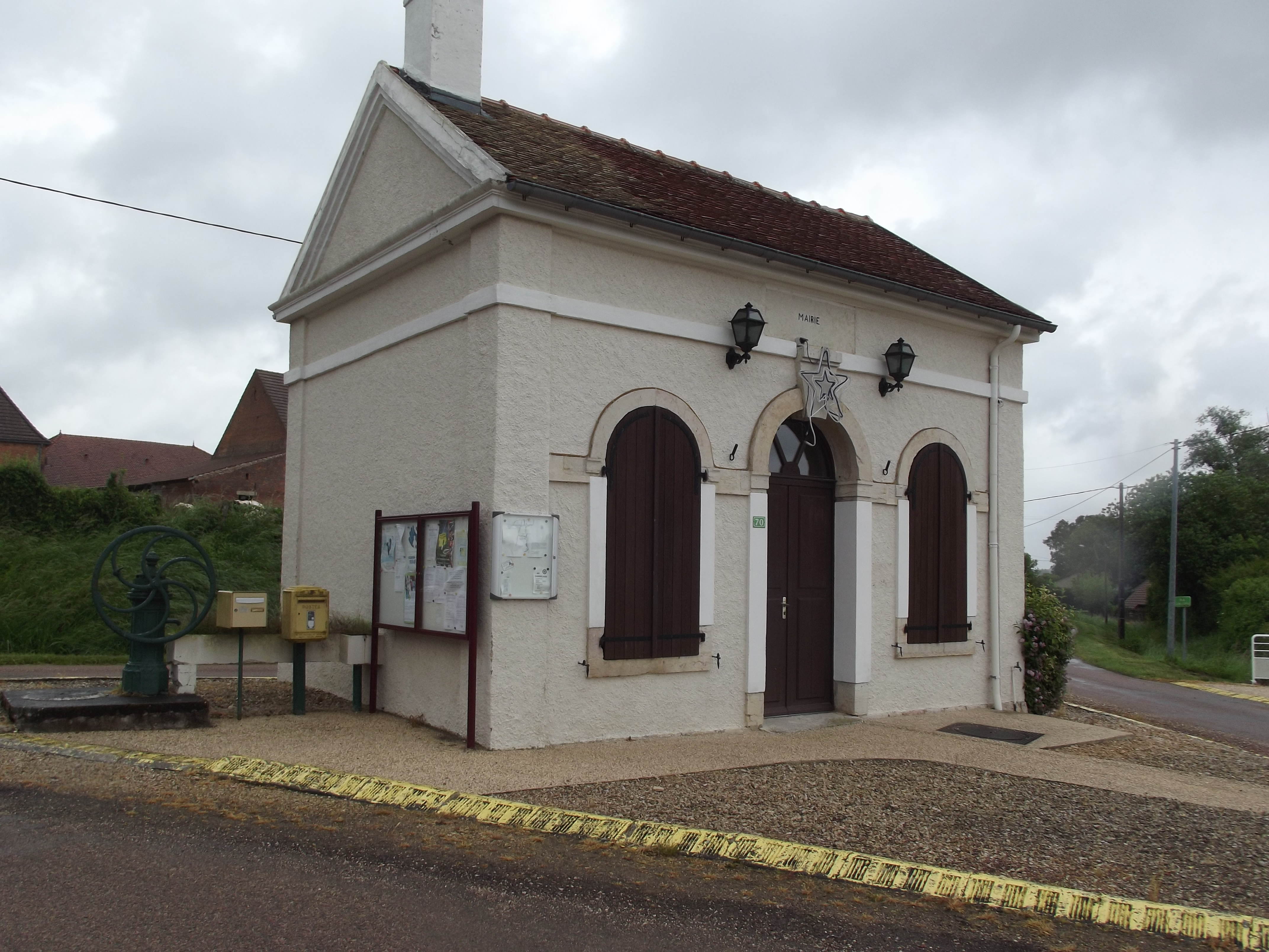 Das Gebäude der Mairie von Clux, in Betrieb bis zur Fusion mit der Gemeinde La Villeneuve per 1.1.2015